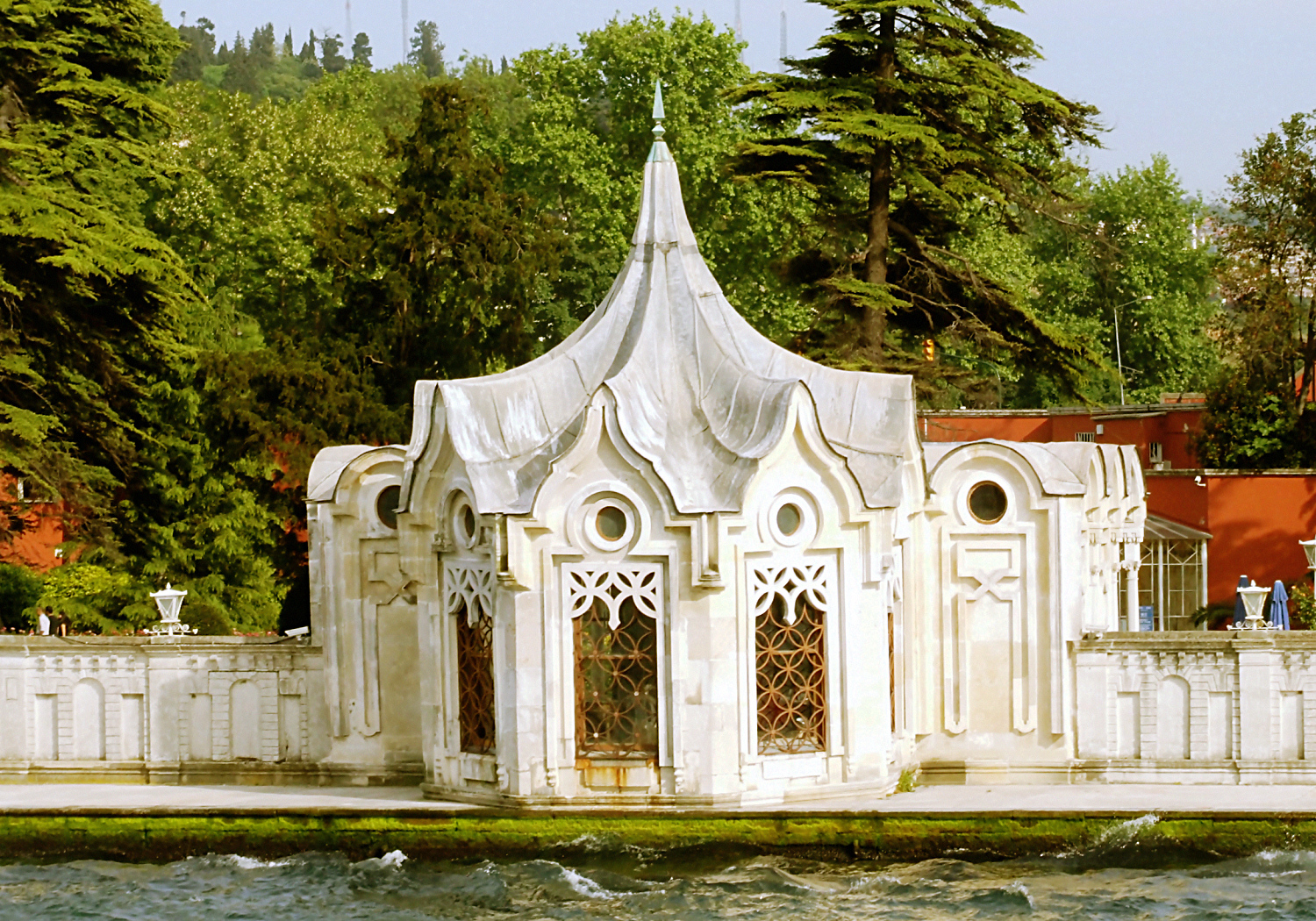 Stambuł, pałac Beylerbeyi, wejście ; Istambul, Beylerbeyi palace, entrace